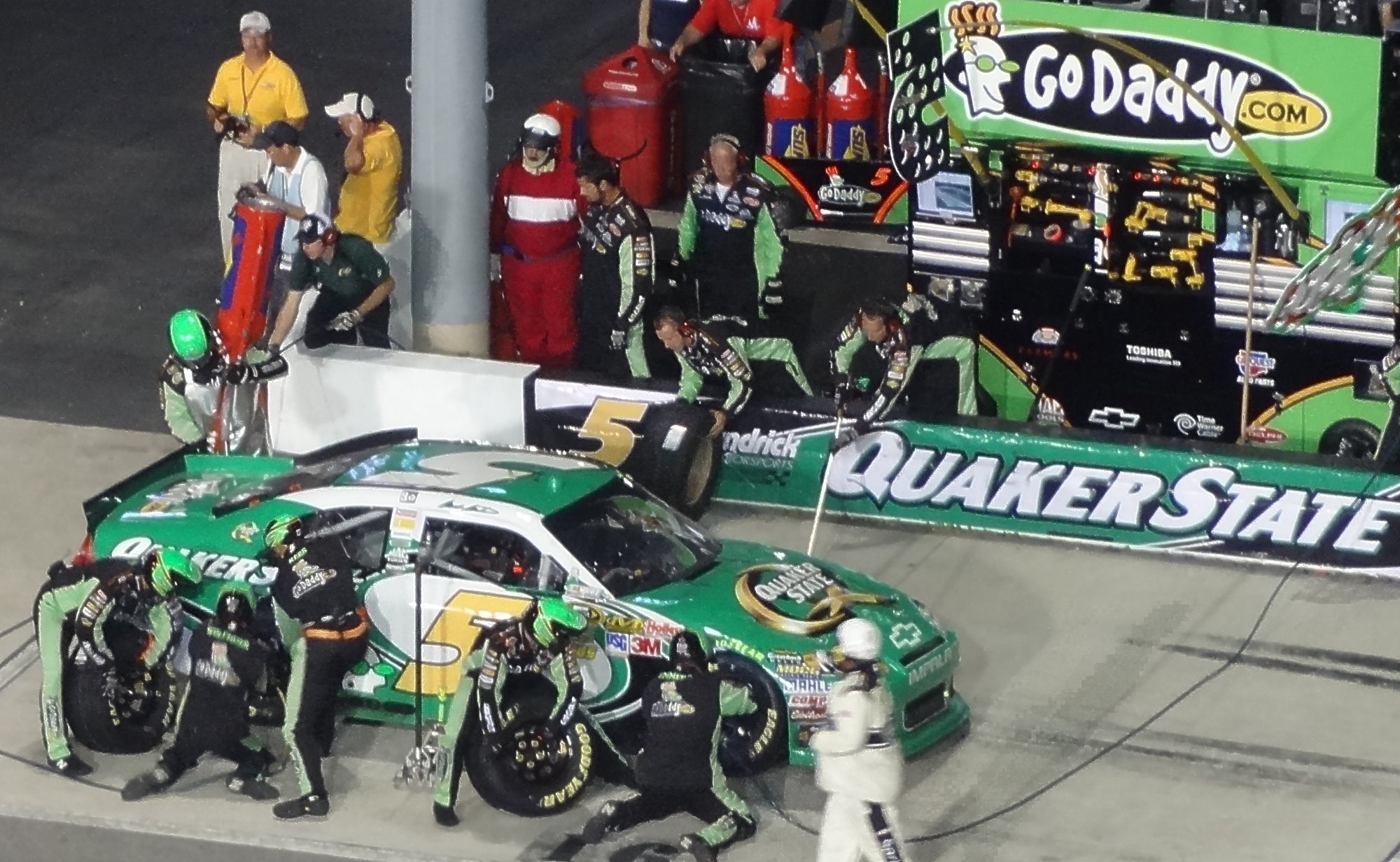 Mark Martin während eines Pit-Stops beim Wonderful Pistachios 400 2011.